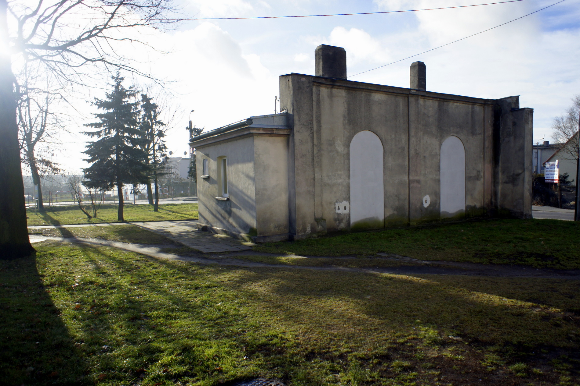 Krotoszyn. Nieopodal zieleńca przy ul. Ostrowskiej znajduje się pozostałość po domu przedpogrzebowym cmentarza żydowskiego, zlikwidowanego przez Niemców podczas okupacji. Dom, po wielokrotnych przebudowach nie związanymi z celami kultowymi.